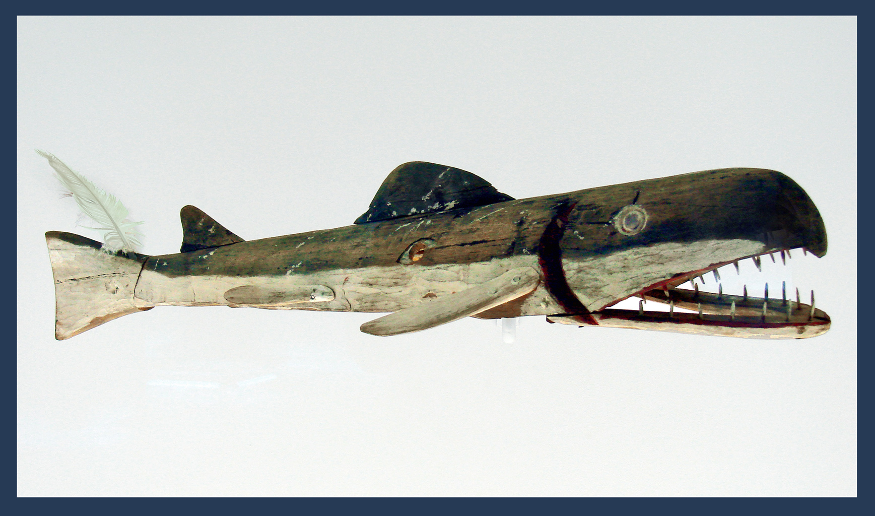 Masque Culture Yup'ik Bois, plumes, pigment Exposition Upside down - les Arctiques Musée du quai Branly